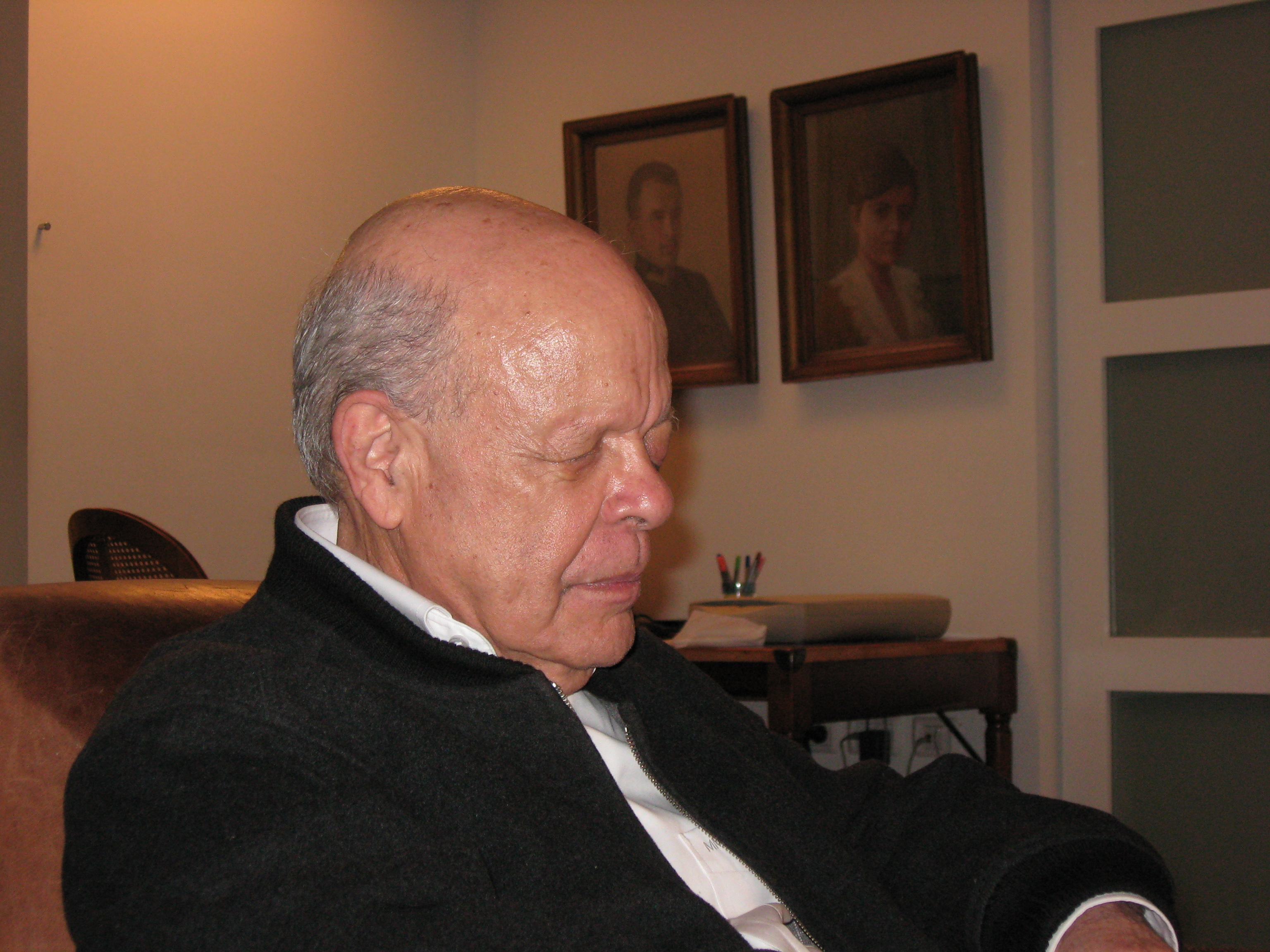 אילן עמית היה מתמטיקאי והוגה דעות ישראלי, מעובדי רפא"ל ו"המוסד"